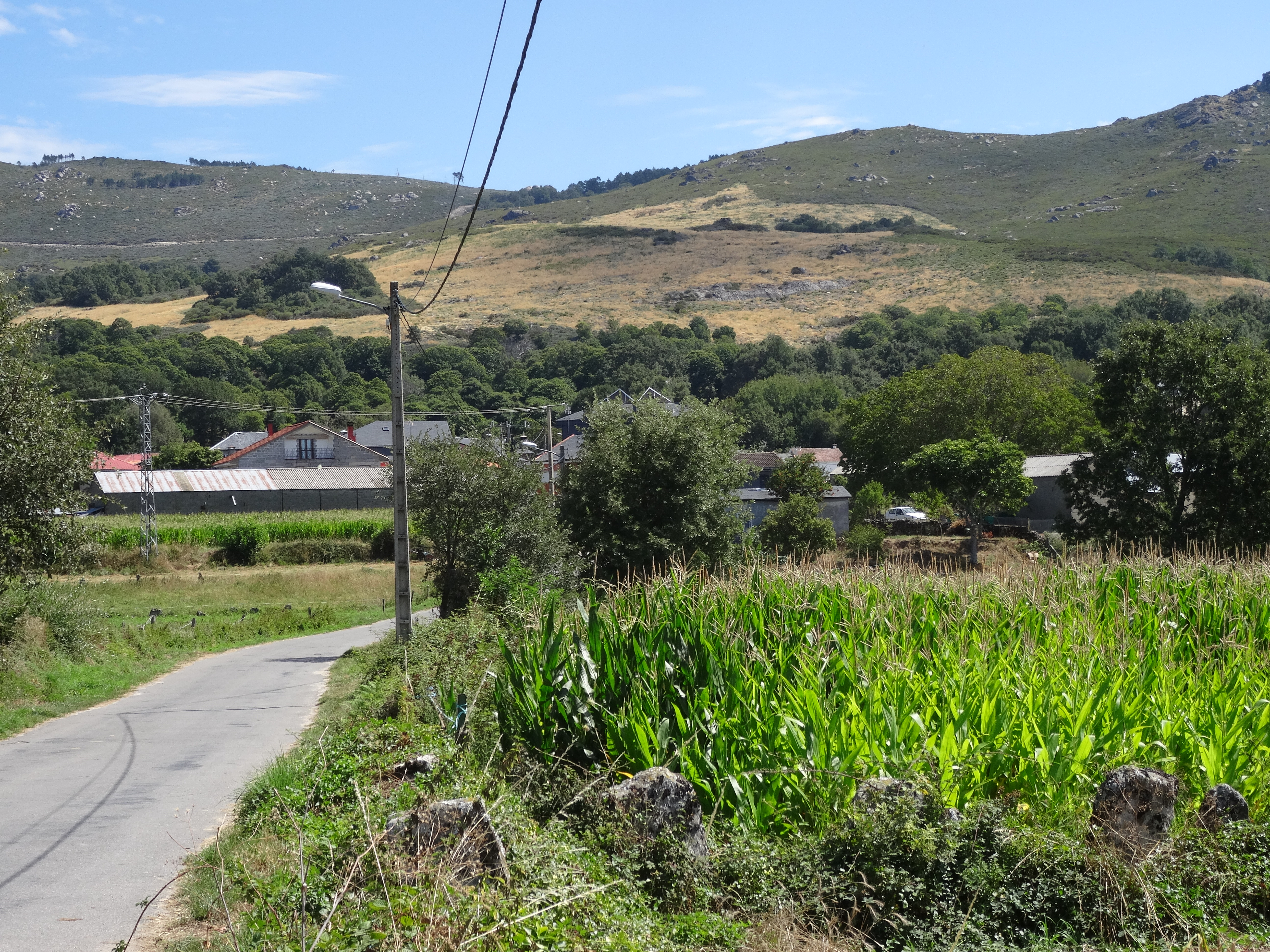 Ver título.